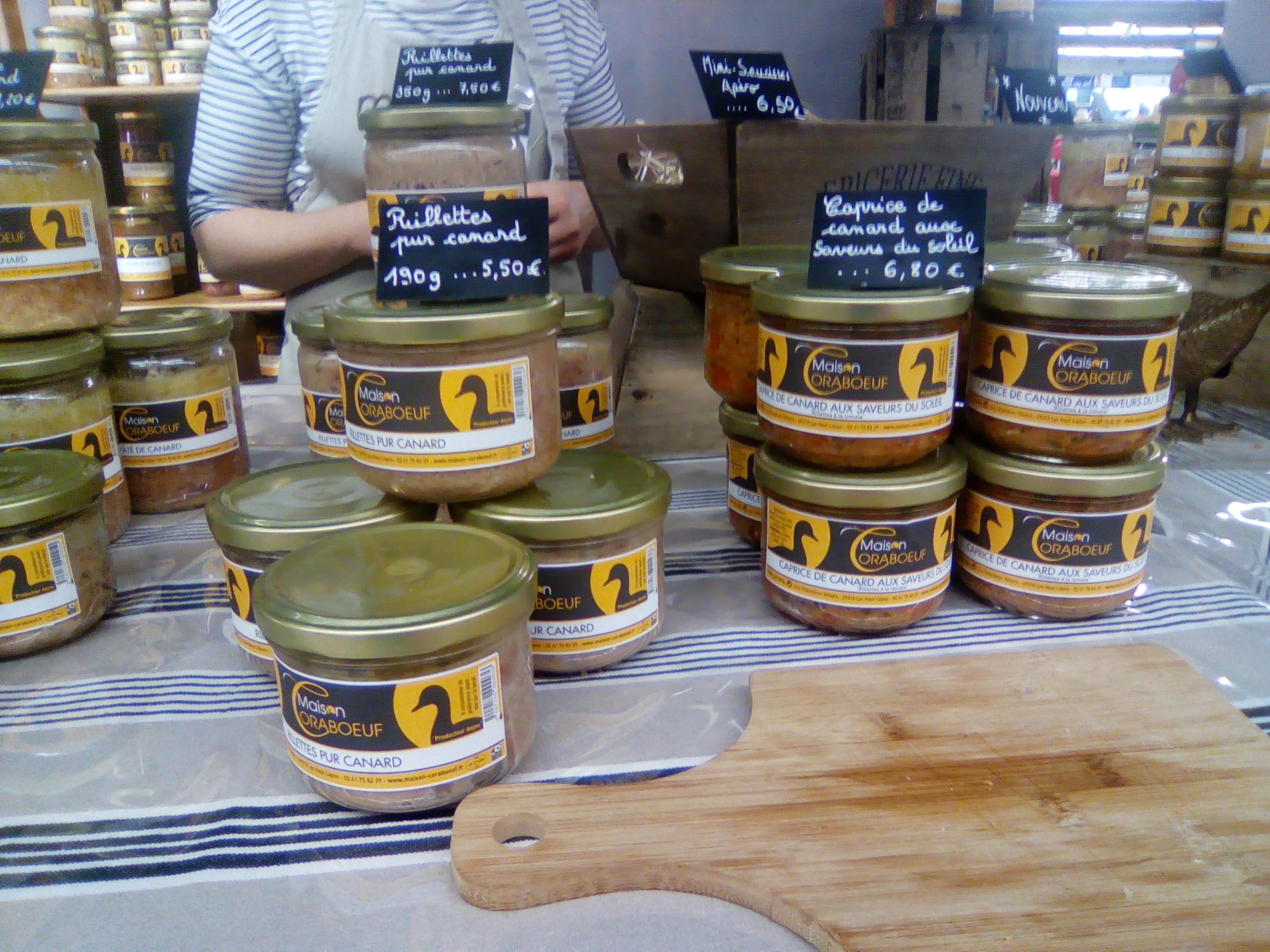 Salon "Pari fermier" à l'Espace Champerret, octobre 2017